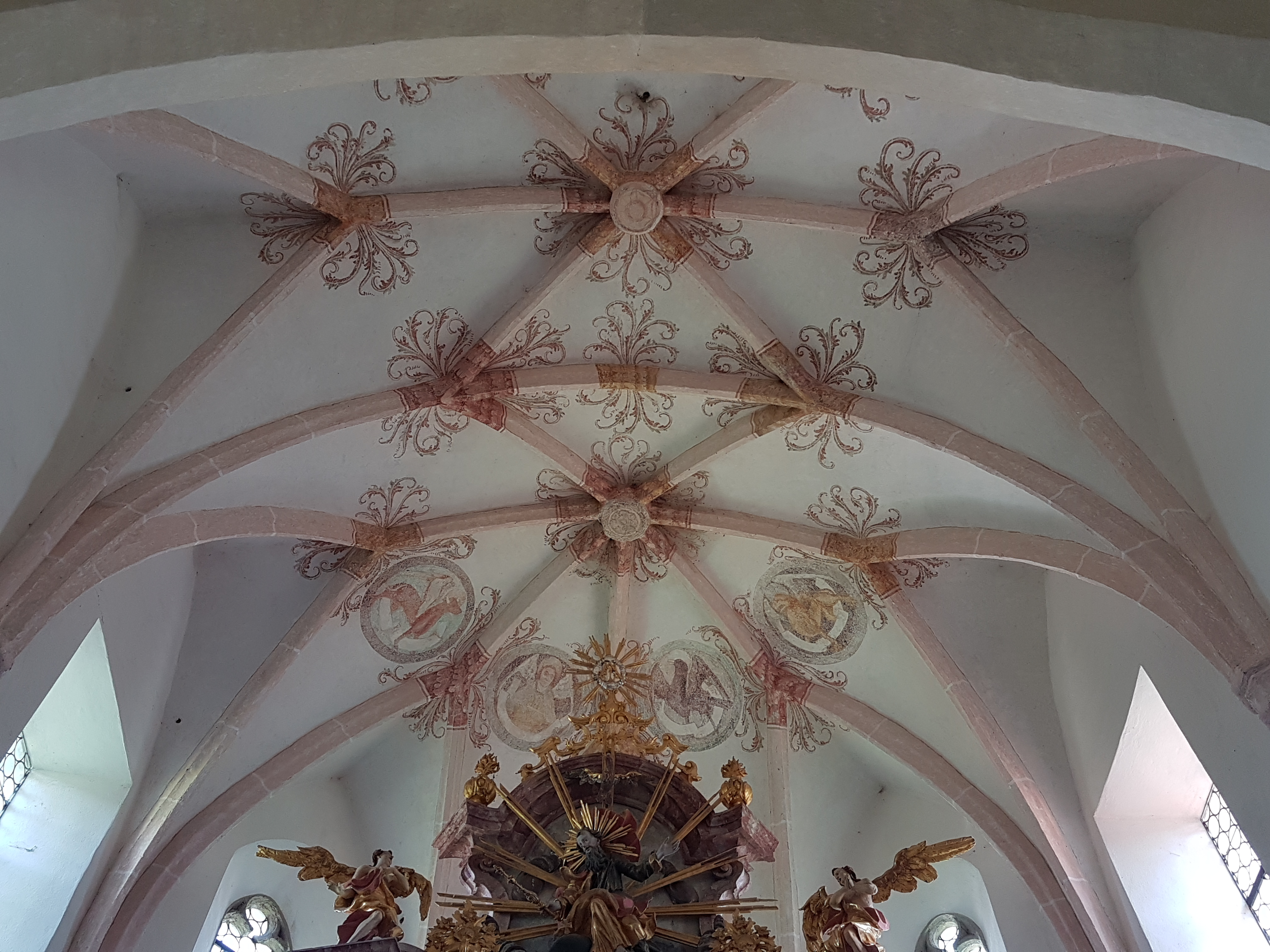 Maria Himmelfahrt (Kirchhof)